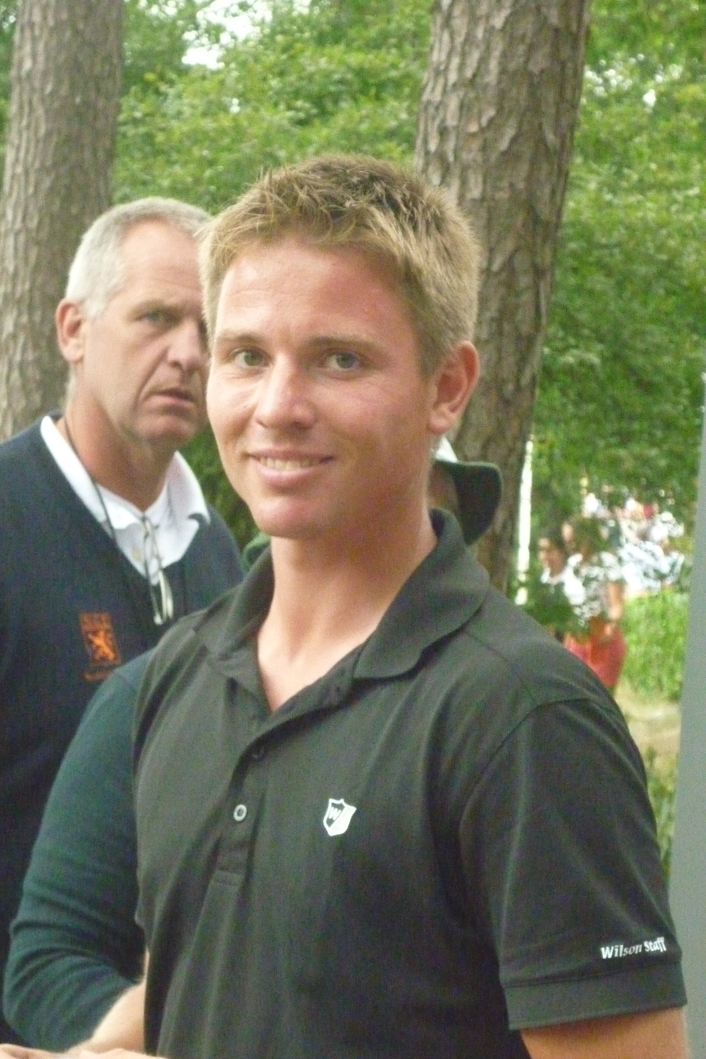 Michael Kraaijm winaar Dutch Junior Open